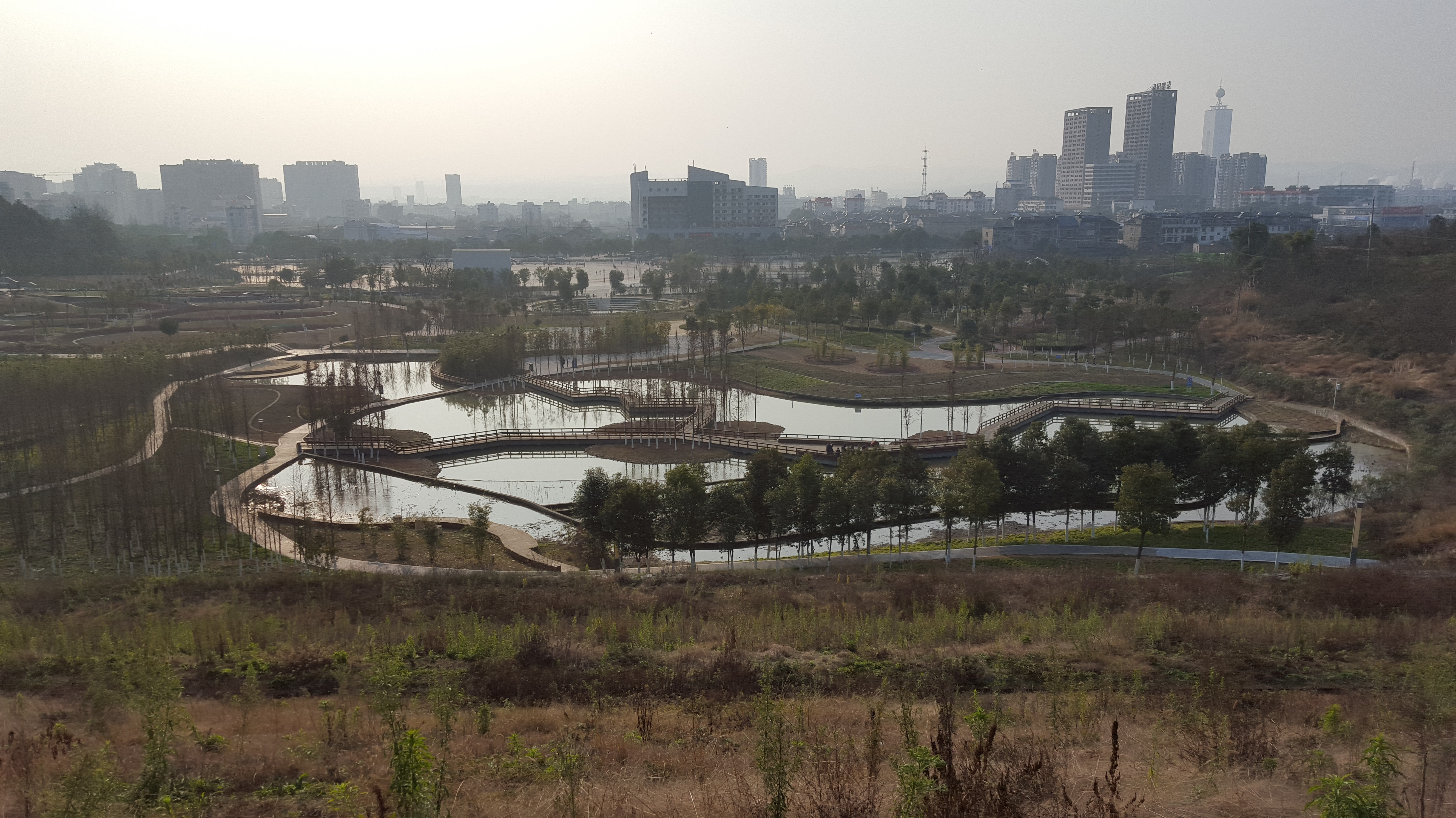 中文（中国大陆）: 猇亭六泉湖公园